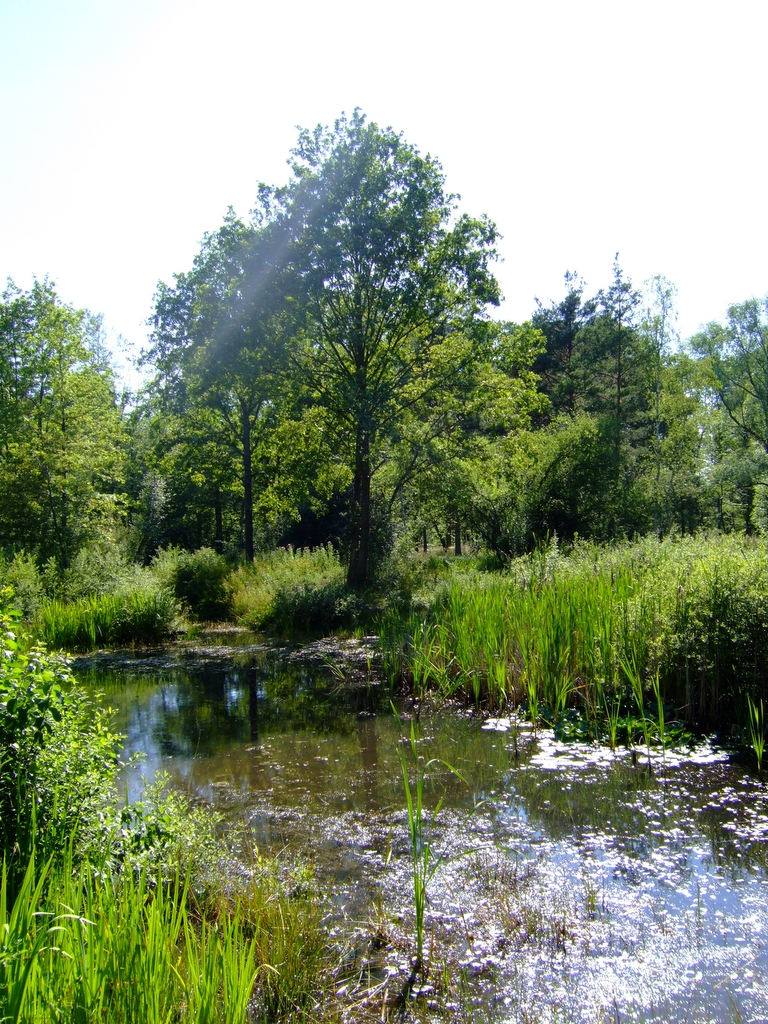 Das Photo zeigt das Feuchtgebiet Daimler-Platz in Stuttgart-Weilimdorf . Aufgenommen am 16. Juli 2006 durch Benutzer MBL. -selbst aufgenommen